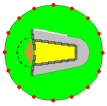 Wedge tomb